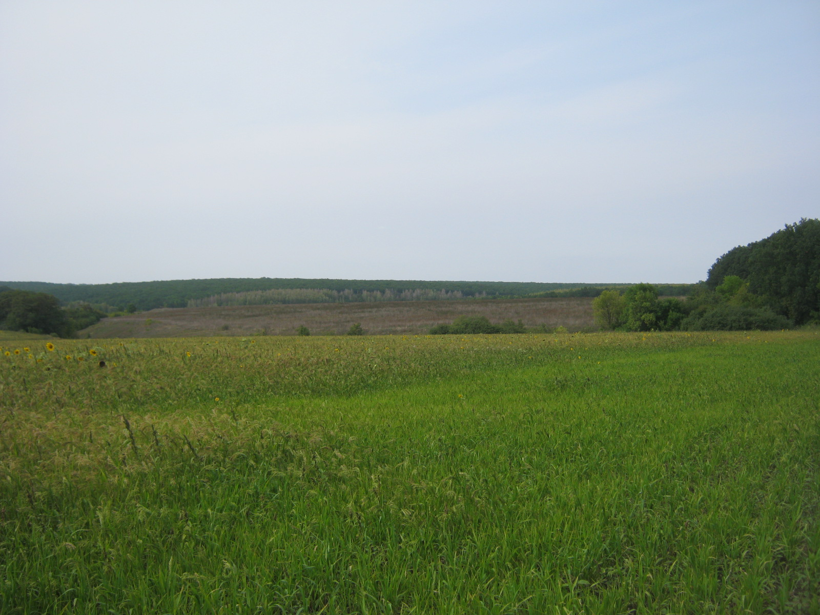 Коломацький р-н